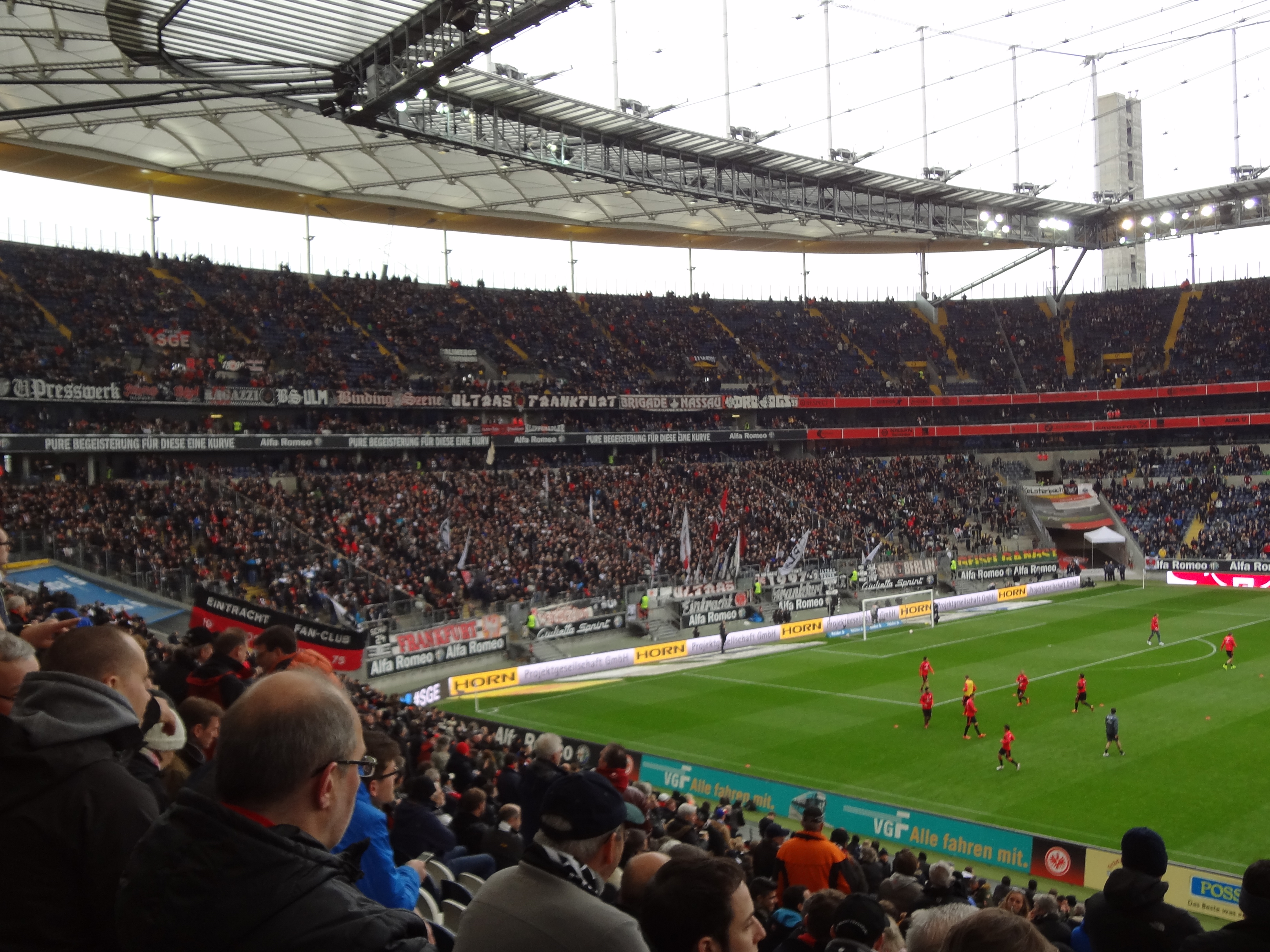 Commerzbank-Arena (Westtribüne)